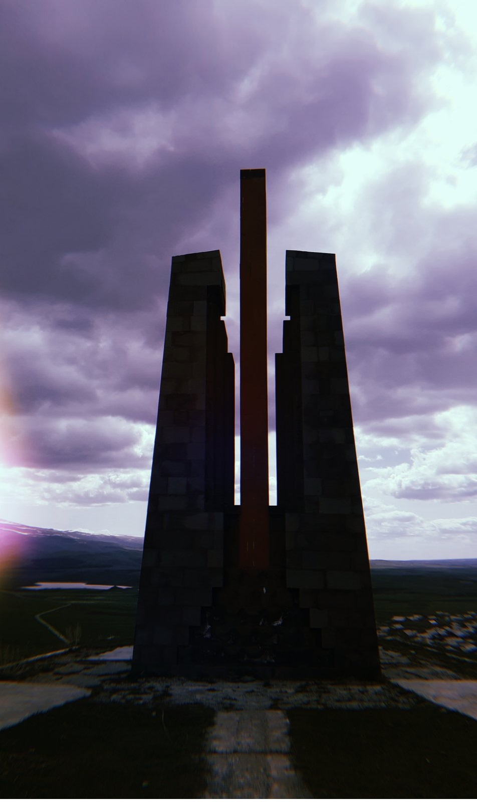 Մելիքգյուղի՝ հայրենական պատերազմի զոհերին նվիրված հուշարձան